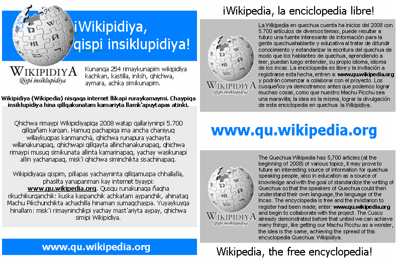 Runa Simi: Volante a repartir en Cusco sobre la Wikipidiya.